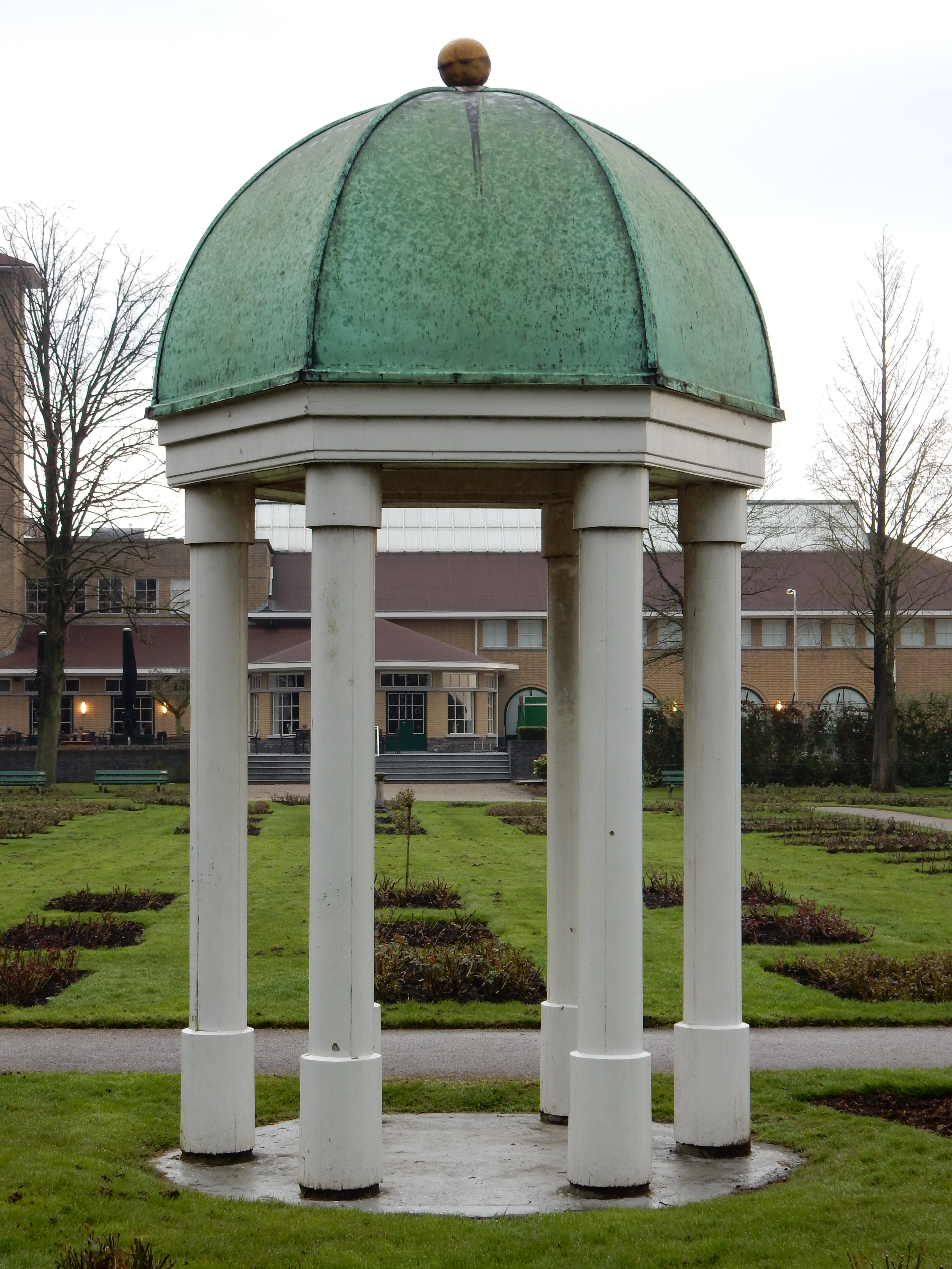 Koepel rosarium en op de achtergrond Tentoonstellingsgebouw Flora